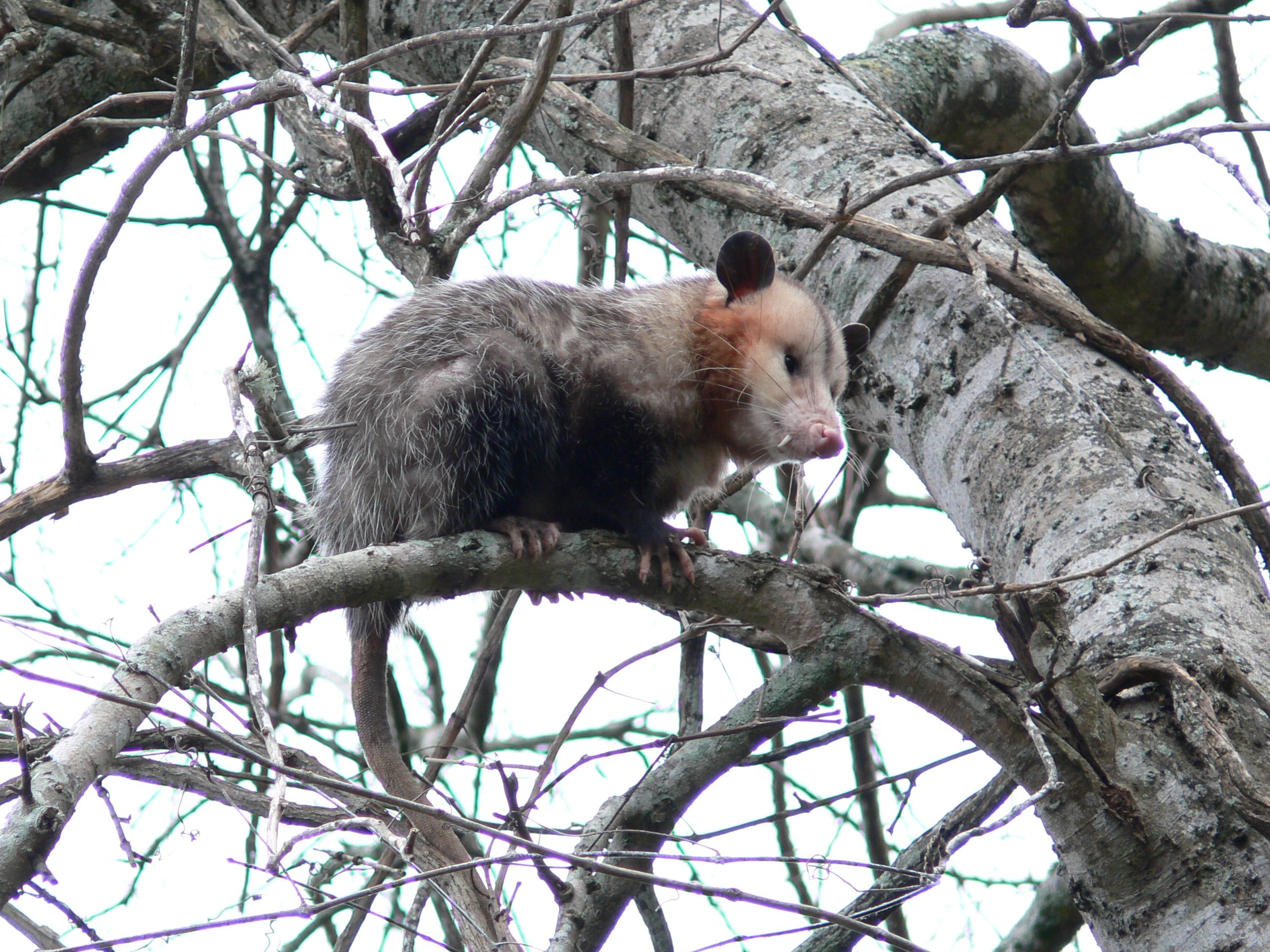 Nordopposum